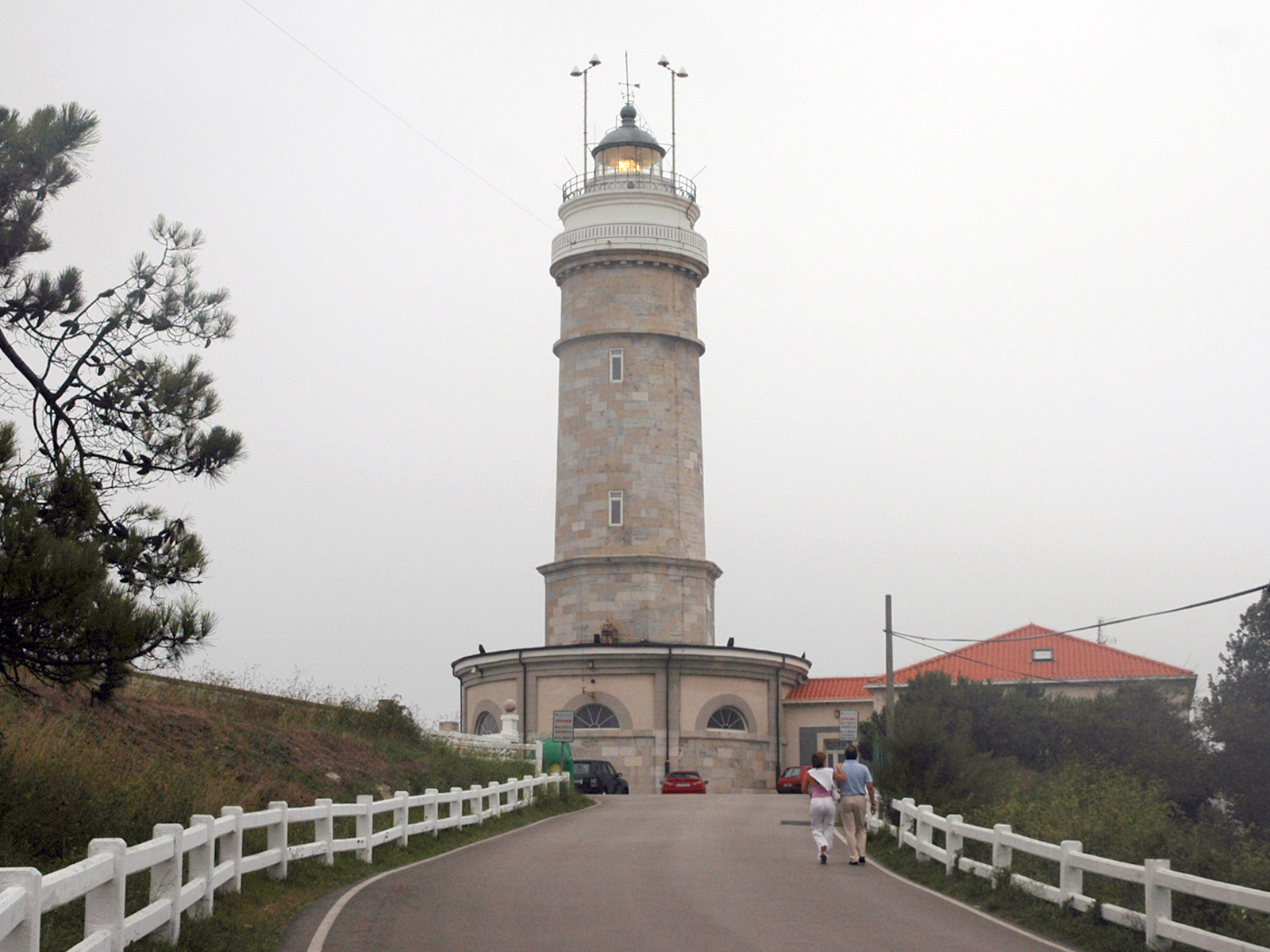 Faro de Cabo Mayor Autor: Ramón Noriega